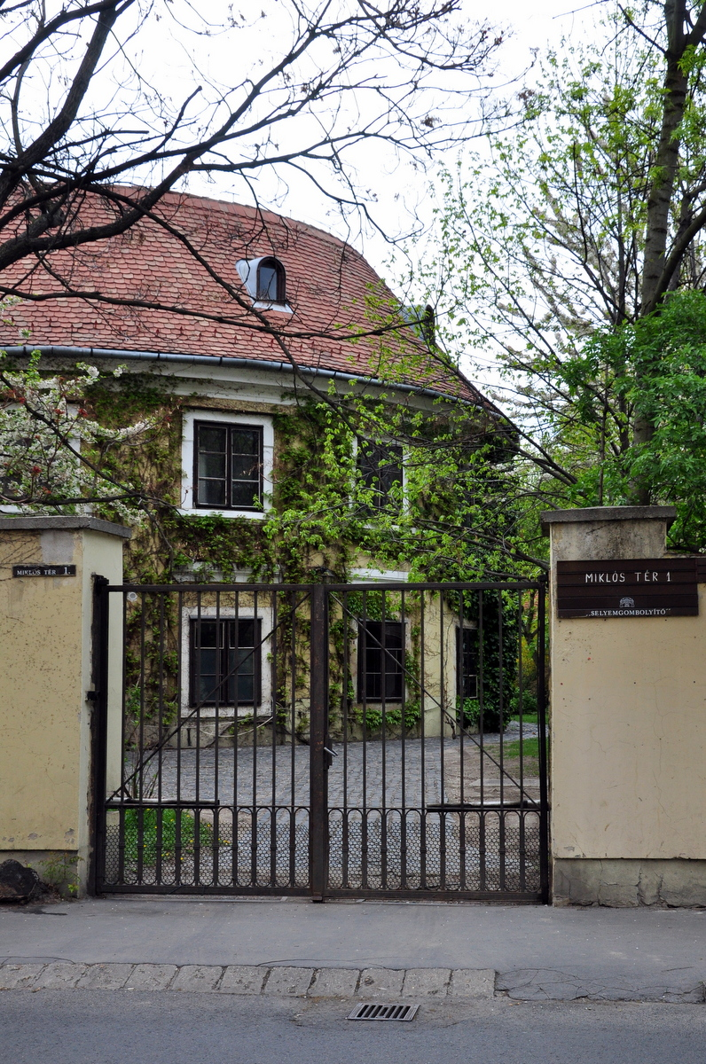 Selyemgombolyító, Óbuda, Budapest